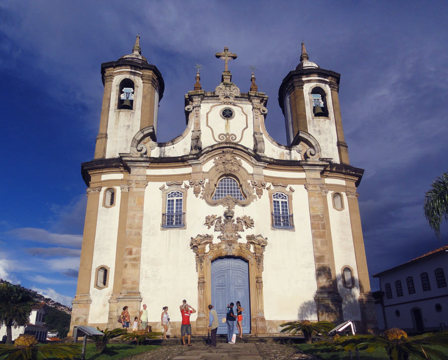 Igreja de Nossa Senhora do Carmo